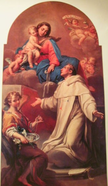 La Virgen apareciéndose a Simón de Rojas dando de comer a los pobres, cuadro del s. XVII